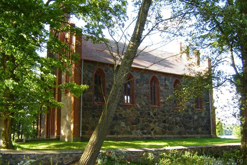 Stare Drawsko - rzymskokatolicki kościół filialny p.w. Wszystkich Świętych, neogotycki z 1870 r.